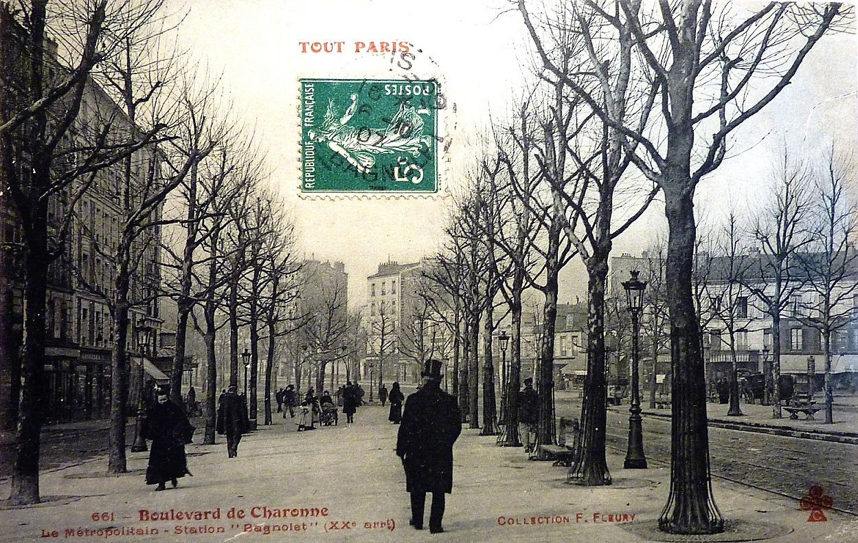 Carte postale - 661 - Boulevard de Charonne Le Métropolitain - Station Bagnolet (XXe arrondissement)